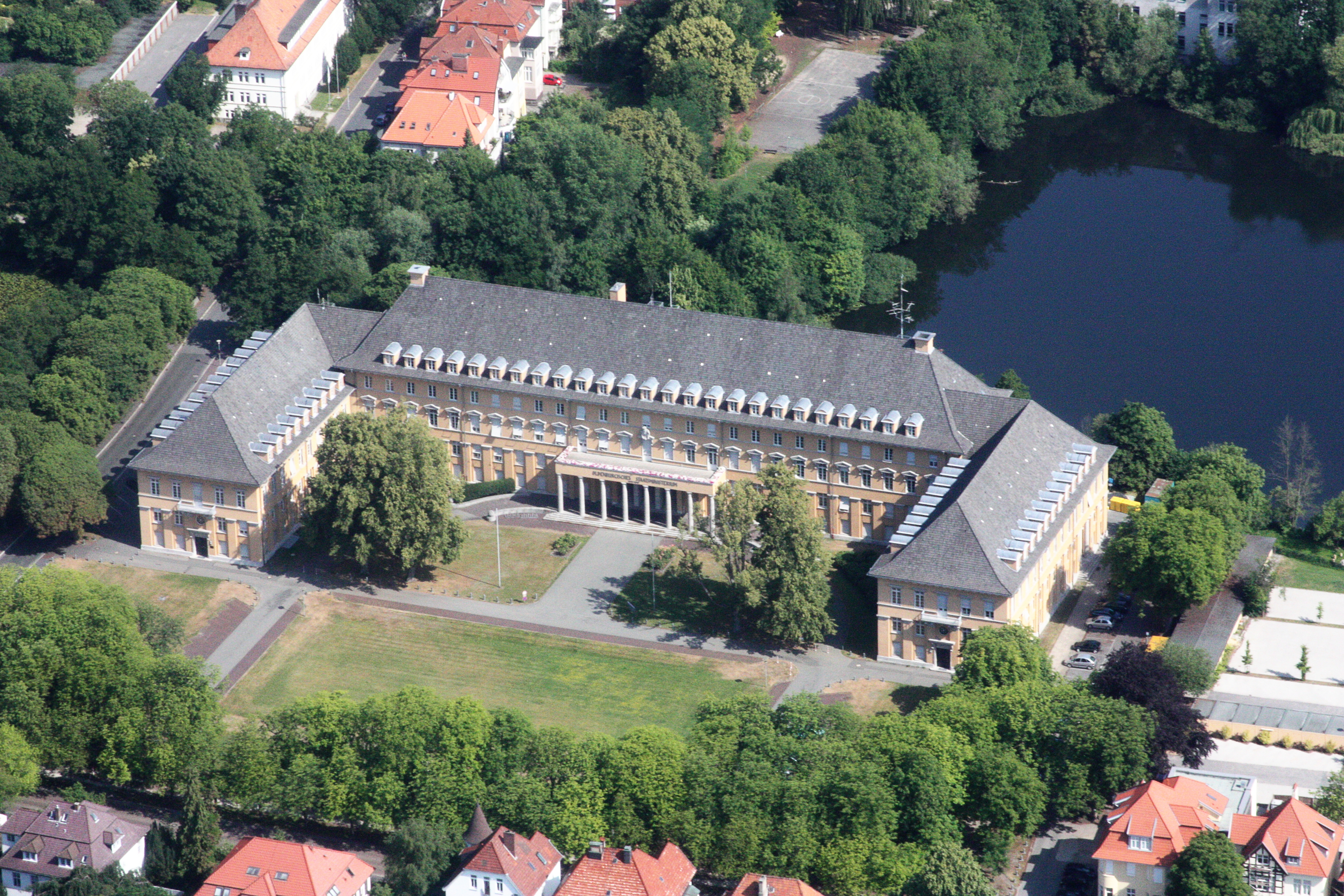 Luftaufnahmen Oldenburg (Oldenburg), mit Weiterflug nach Westen; 1500 Fuß Flughöhe; Juli 2010; Originalfoto bearbeitet: Tonwertkorrektur und Bild geschärft mit Hochpassfilter